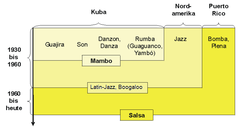 Entstehung der Salsa: Die zeitliche Entstehung der Salsa und ihre Hauptquellen.